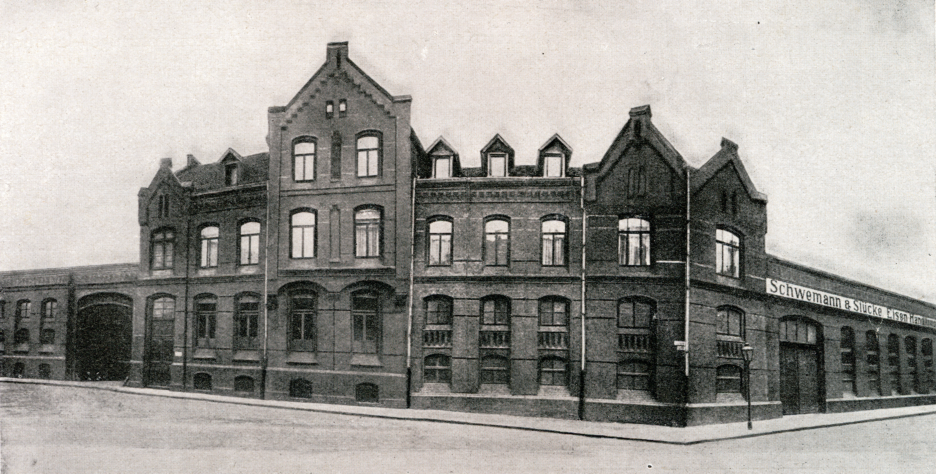 Das im Jahr 1899 als neues Geschäftshaus mit Lager für die Eisengroßhandlung Schwemann & Stücke in der Südstadt von Hannover errichtete Gebäude unter der Adresse Kestnerstraße 63, die hier rechts aus dem Bild herausläuft. Nach ersten Zerstörung während der Luftangriffe auf Hannover im Zweiten Weltkrieg in der Nacht vom 8. auf den 9. Oktober 1943 wurden die Gebäude ab 1945 auf dem selben Gelände in veränderter Form neu aufgebaut. Nach der Insolvenz des Unternehmens, das zuletzt in Geschäftsräumen am Gutenberghof firmierte, wurden die Gebäude abgerissen. Die hier gezeigte gescannte Abbildung stammt aus Paul Siedentopf: Schwemann & Stücke, in: Das Buch der alten Firmen der Stadt Hannover im Jahre 1927, Jubiläums-Verlag Walter Gerlach, Leipzig (1927), S. 203 (weitere Literatur siehe bitte im Wikipedia-Artikel) ...